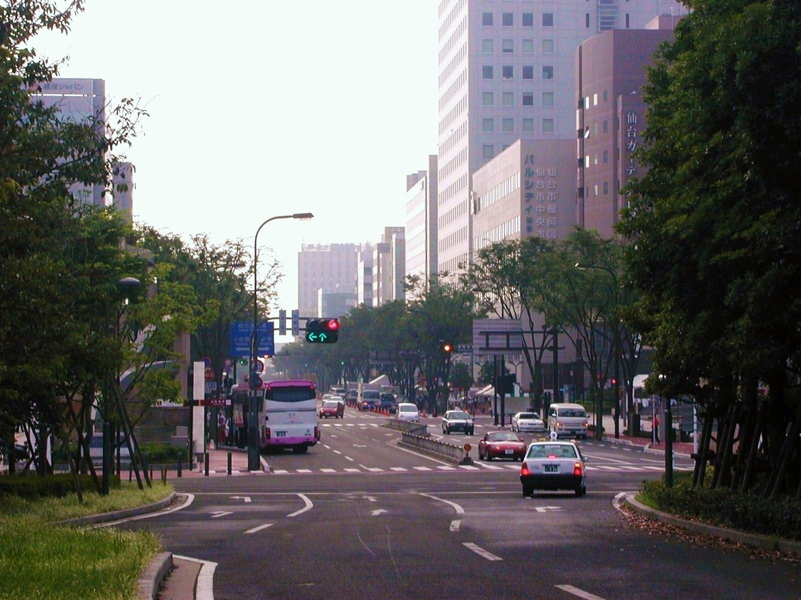 「夏まつり仙台すずめ踊り」開催日の朝に、JR仙台駅東口広場から撮影した宮城野通。